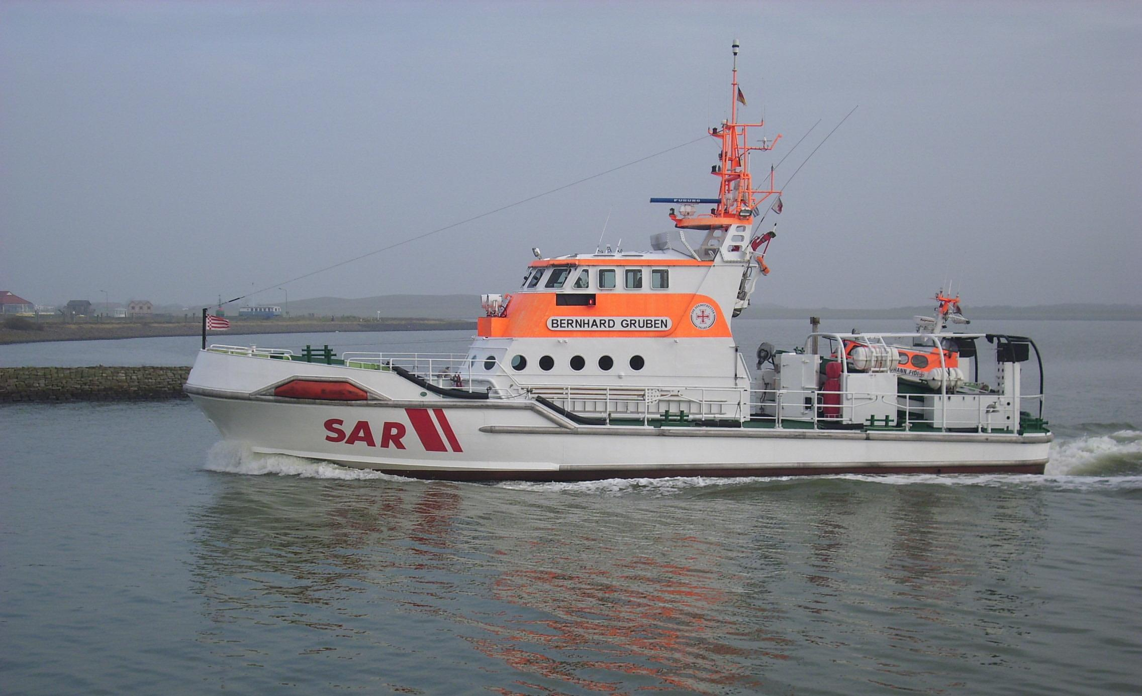 SK Bernhard Gruben beim Einlaufen in den Hafen von Norderney